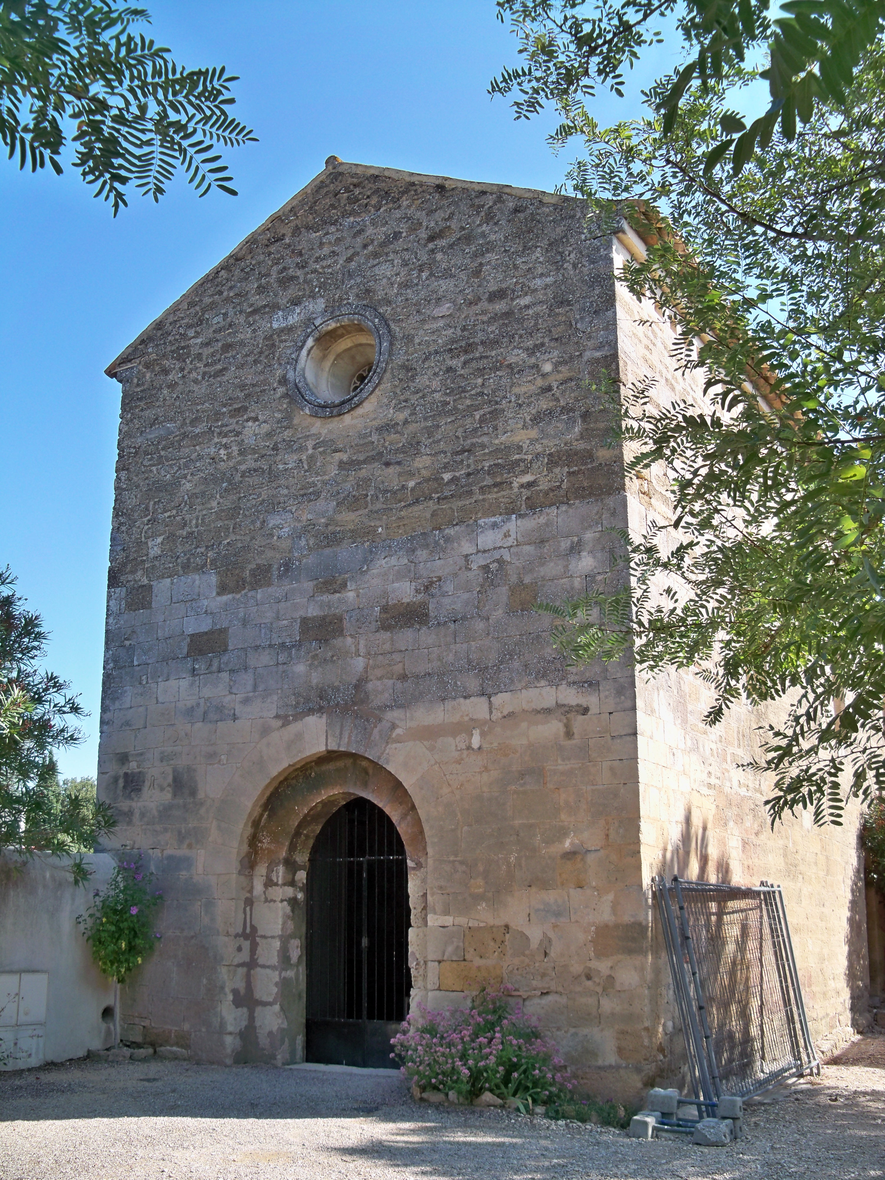 Chapelle Saint-Torquat, hameau Saint-Turquoit, Suze-la-Rousse (Drôme, France).